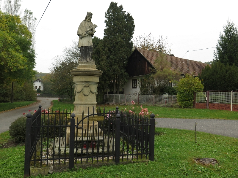 Socha svatého Jana Nepomuckého, Mcely.